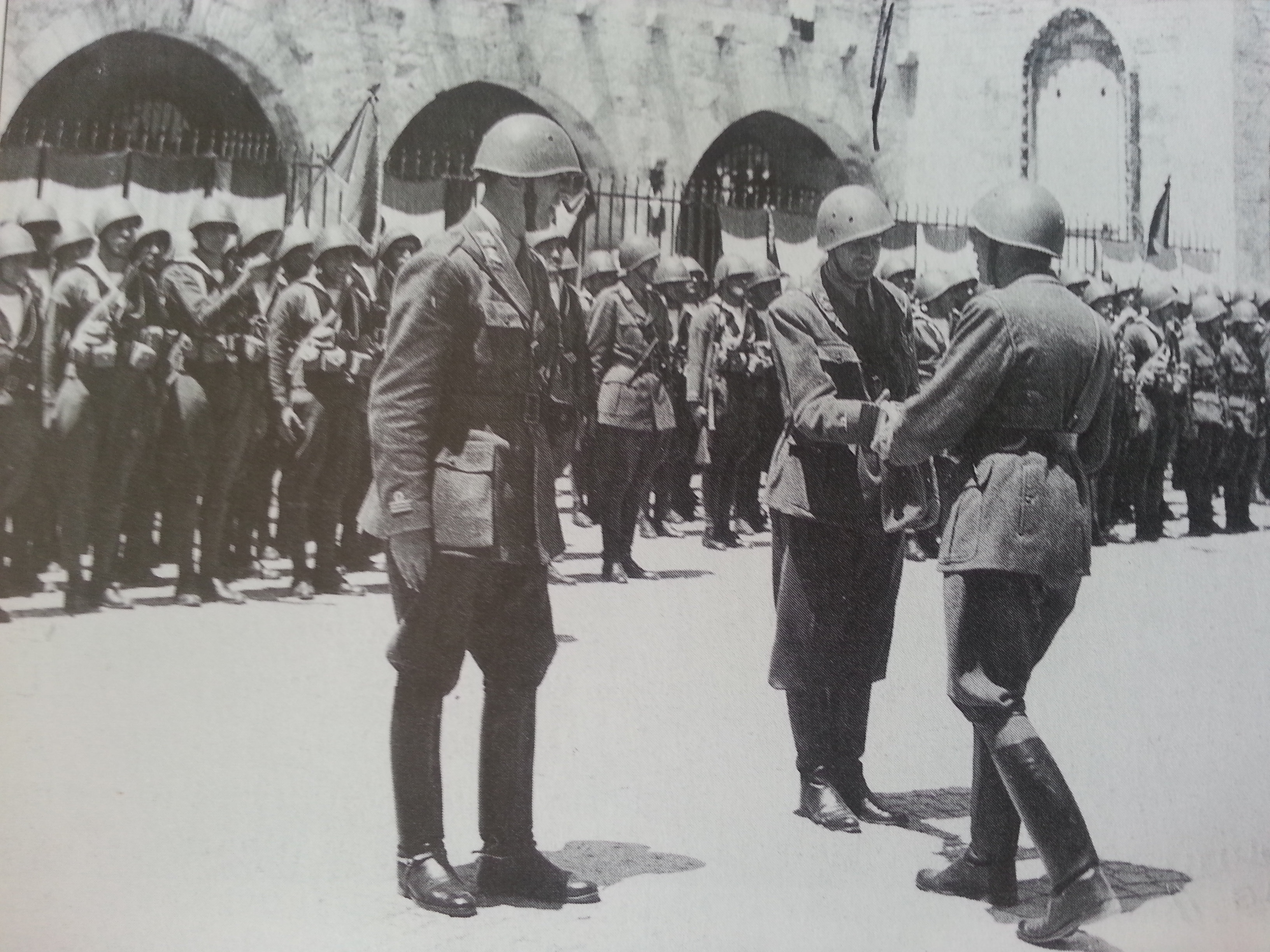 Consegna della fiamme di combattimento al I Battaglione Bafile del Reggimento "San Marco" in procinto di partire per la Grecia, maggio 1941